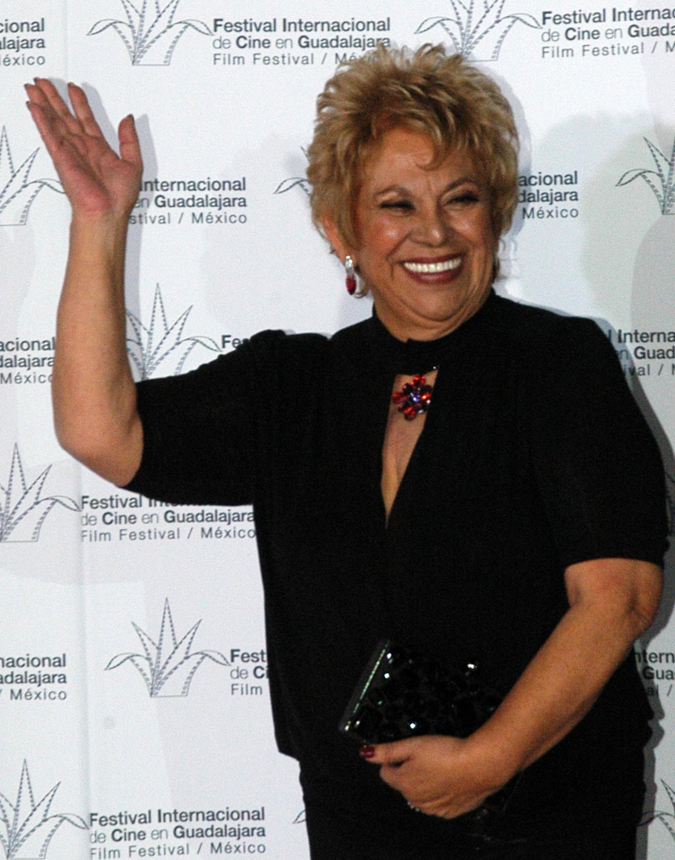 Guadalajara, Jalisco, 14 de marzo de 2008. Lupe Ontiveros en la alfombra roja de la ceremonia de clausura del XXIII Festival Internacional de Cine en Guadalajara.